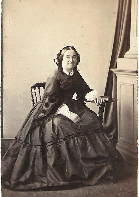 Hermance Ballin circa 1870